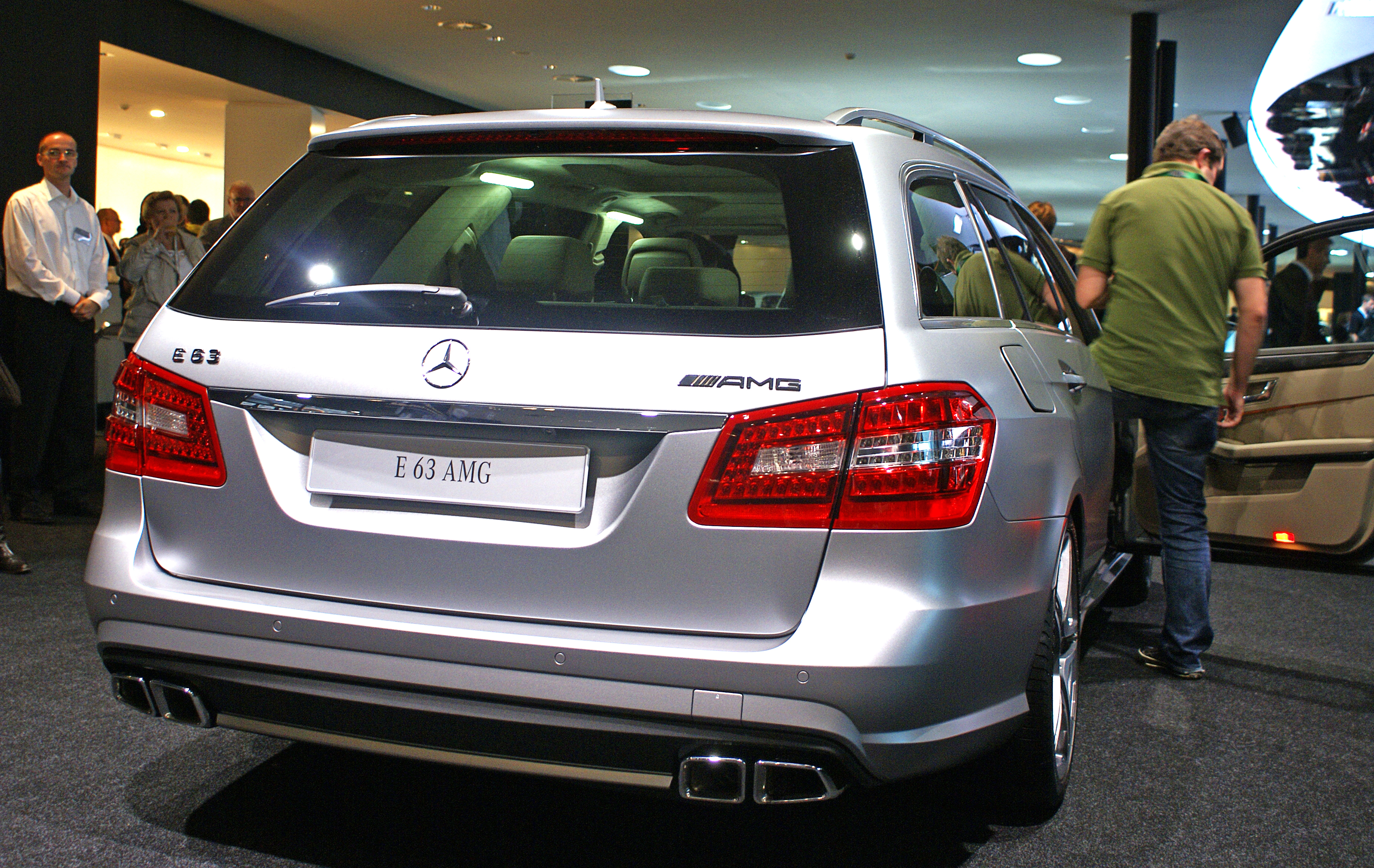 Mercedes-Benz E 63 AMG T